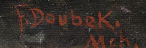 František Bohumil Doubek signatura